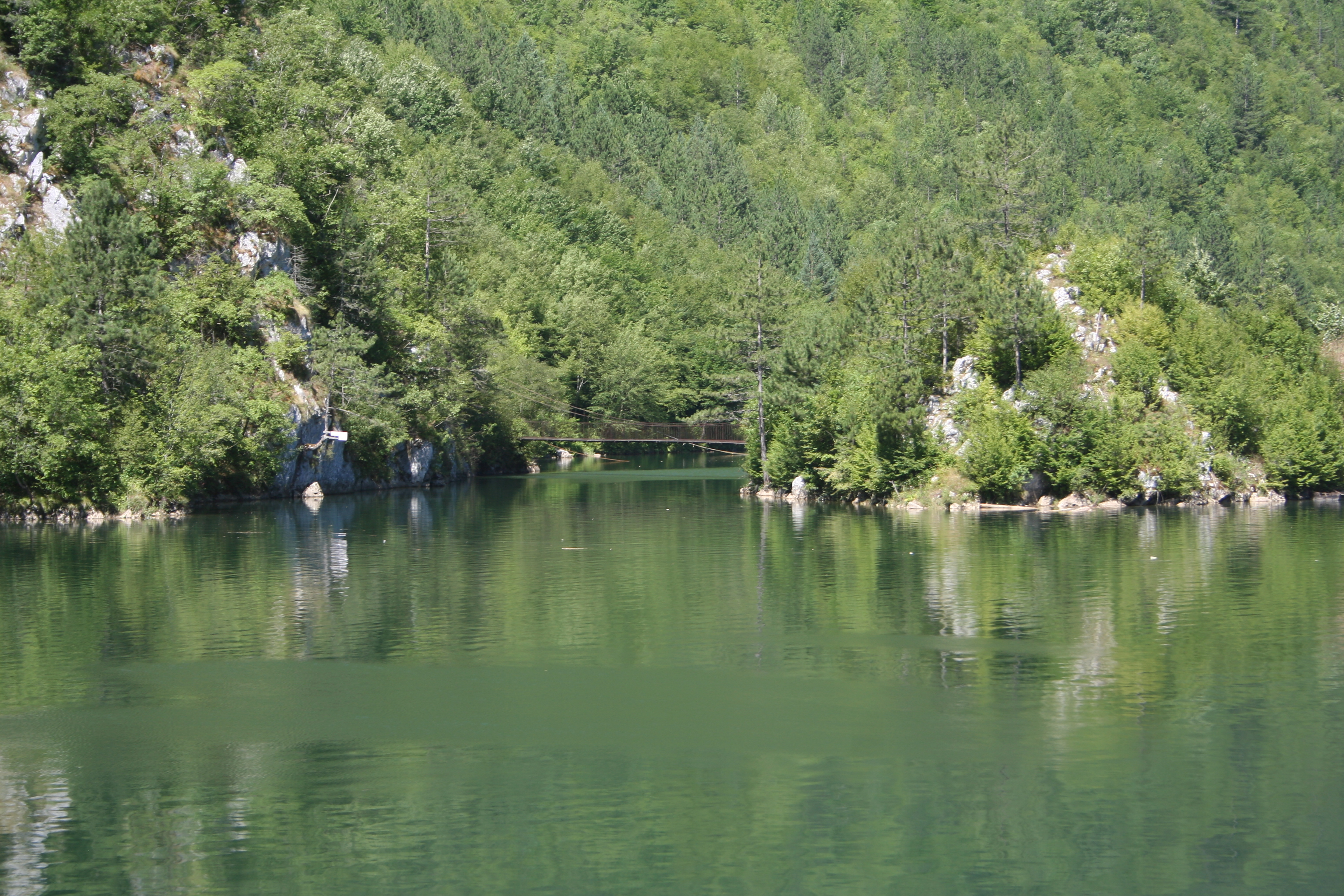 Krstarenje Drinom brodom Grizzly 2, Perućac-Višegrad